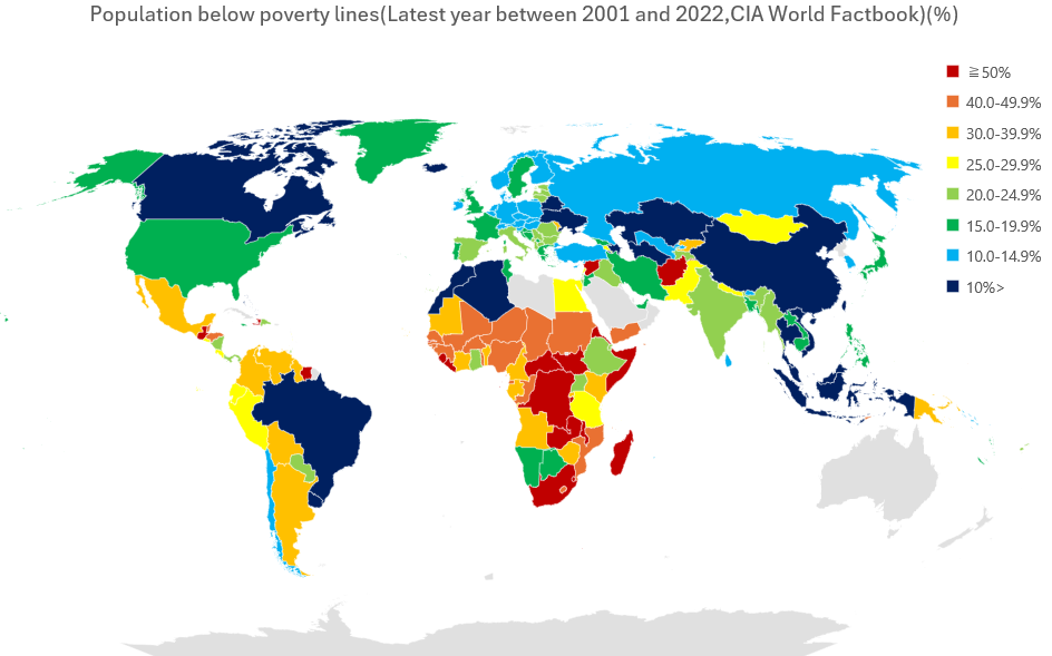 この 画像はGunnMapで作成されましたGunnMap は Arthur Gunn (User:Aaaarg) によって開発されたもので、無償で利用できます。 画像を利用の際は、出典として へのリンクを付記してください。